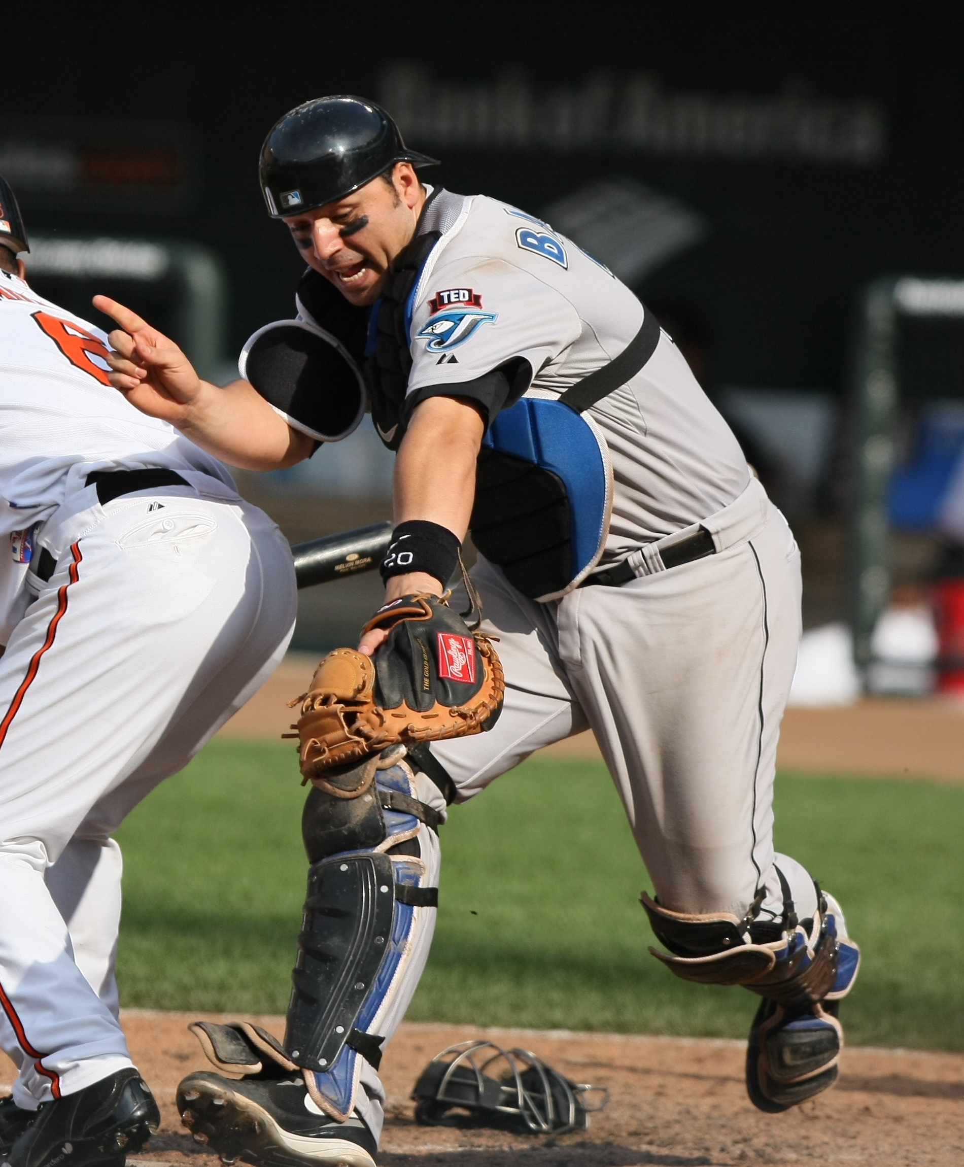 Rod Barajas